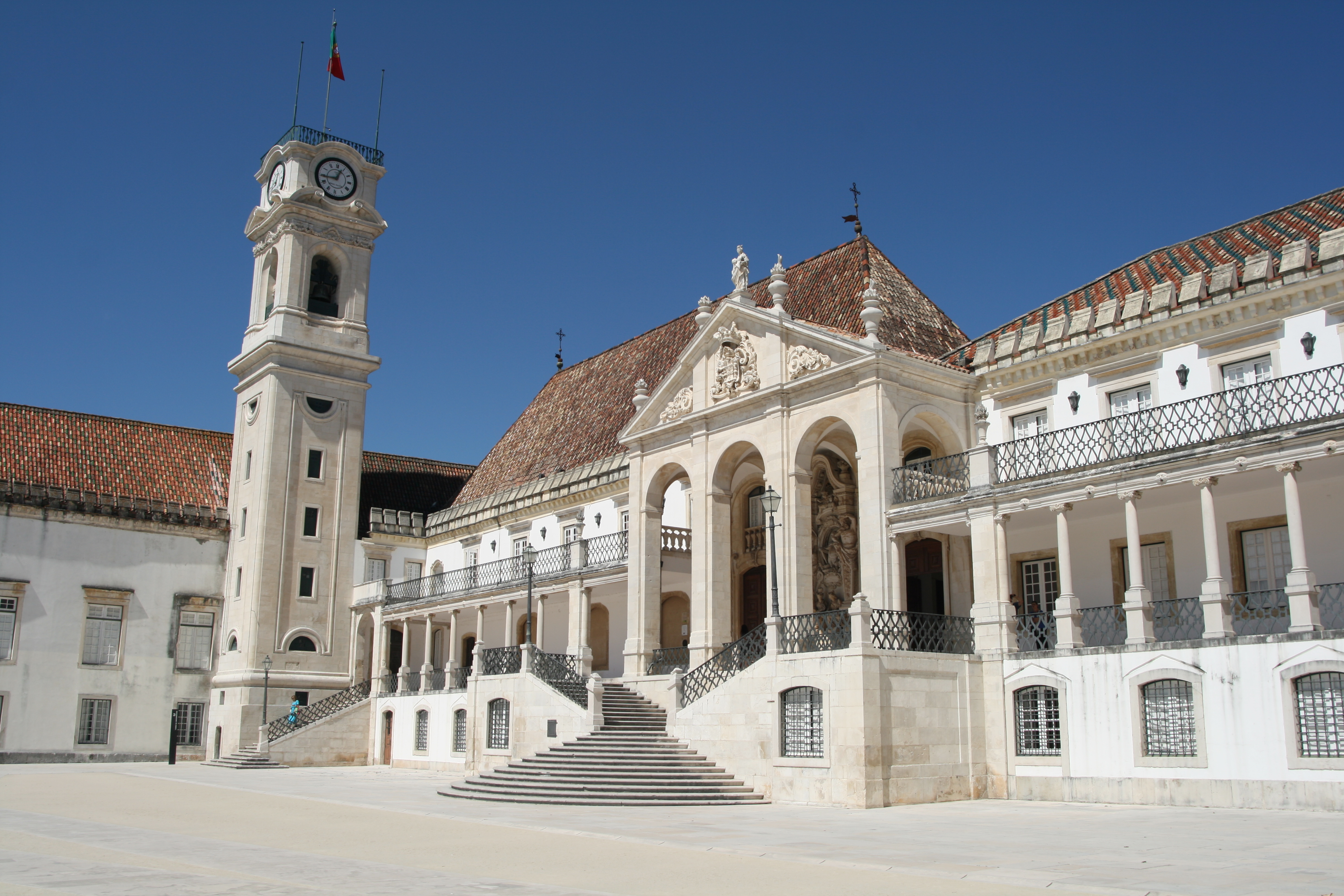 Royal Palace, Universidade de Coimbra